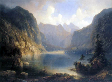 Alpenseepanorama